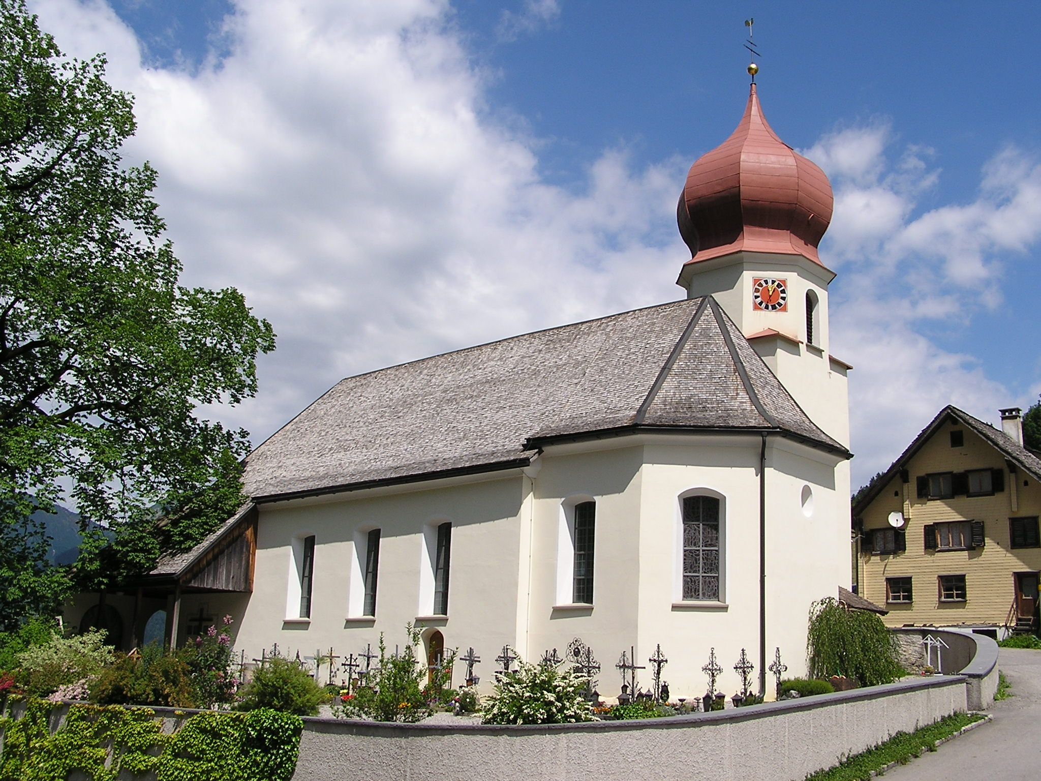 Kirche von Marul (Gemeinde Raggal) Ort & Datum: Sommer 2004